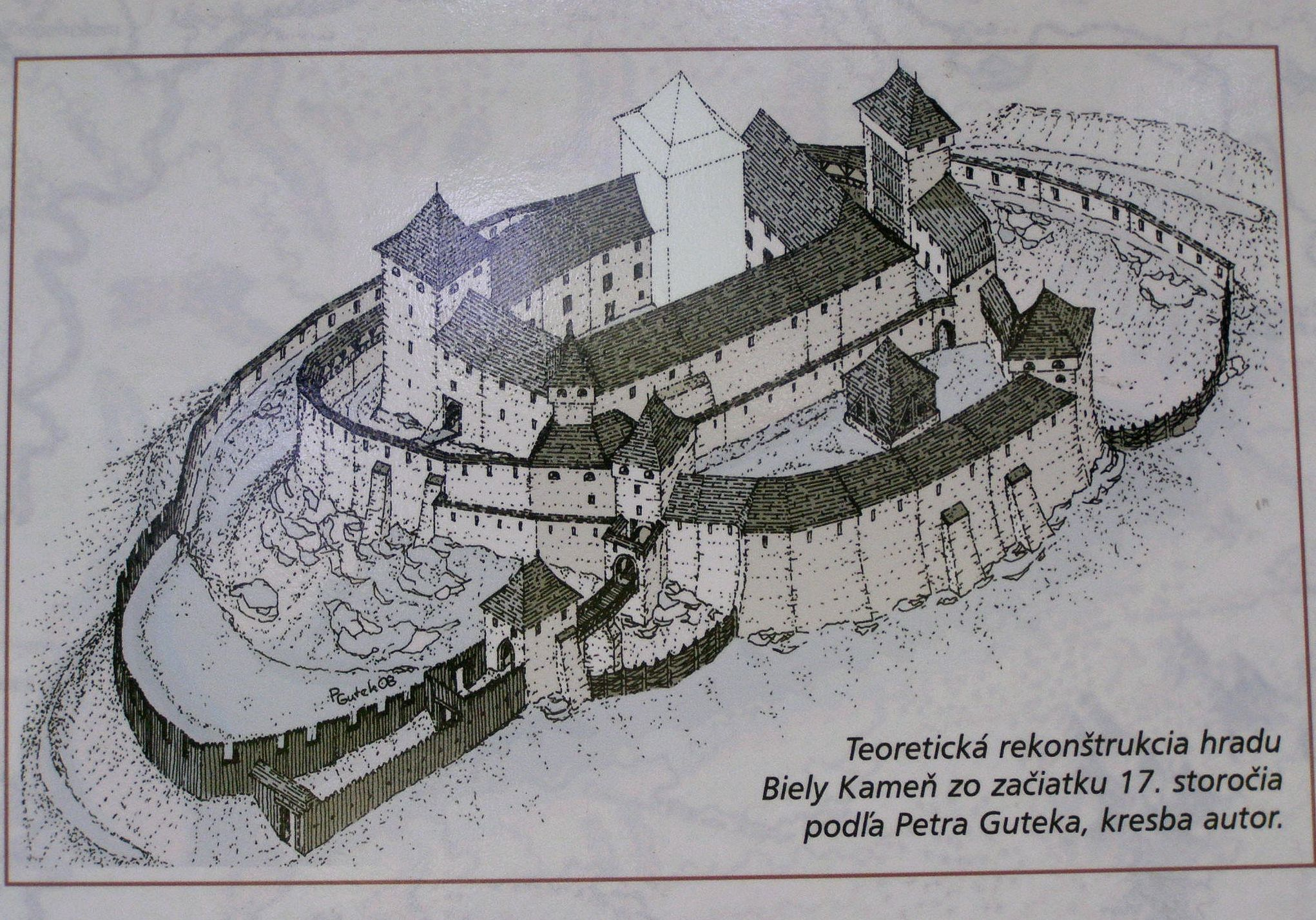 Pravdepodobný vzhľad hradu